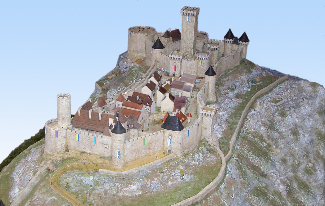 Die Klosteranlage (unten) wird von den Mauern des Bourbonen-Schlosses (oberhalb) umfangen.